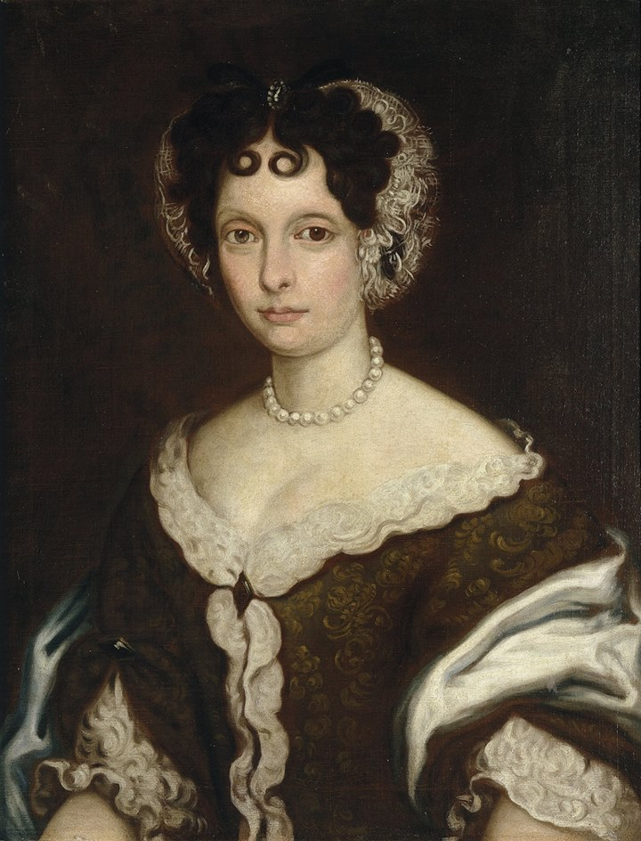 Ritratto di Matilde d'Este (1674-1732), moglie di Camillo II Gonzaga di Novellara.